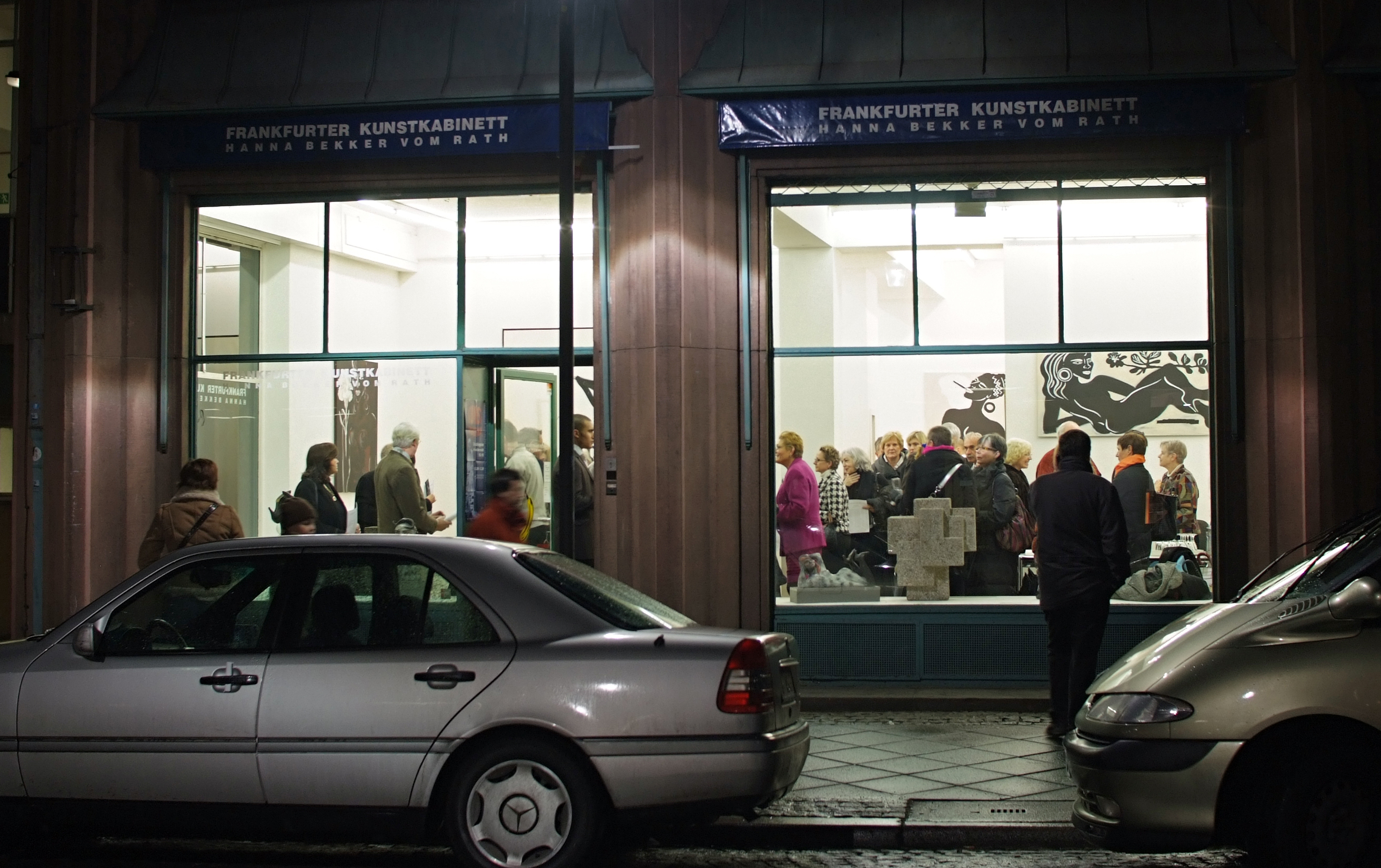 Frankfurter Kunstkabinett Hanna Bekker vom Rath, Vernissage im Februar 2009Freihandaufnahme mit verfügbarem Licht, Sigma 30mm 1:1,4 an Fuji S5 Pro, f 3,5, ISO 400, 1/25 sec.